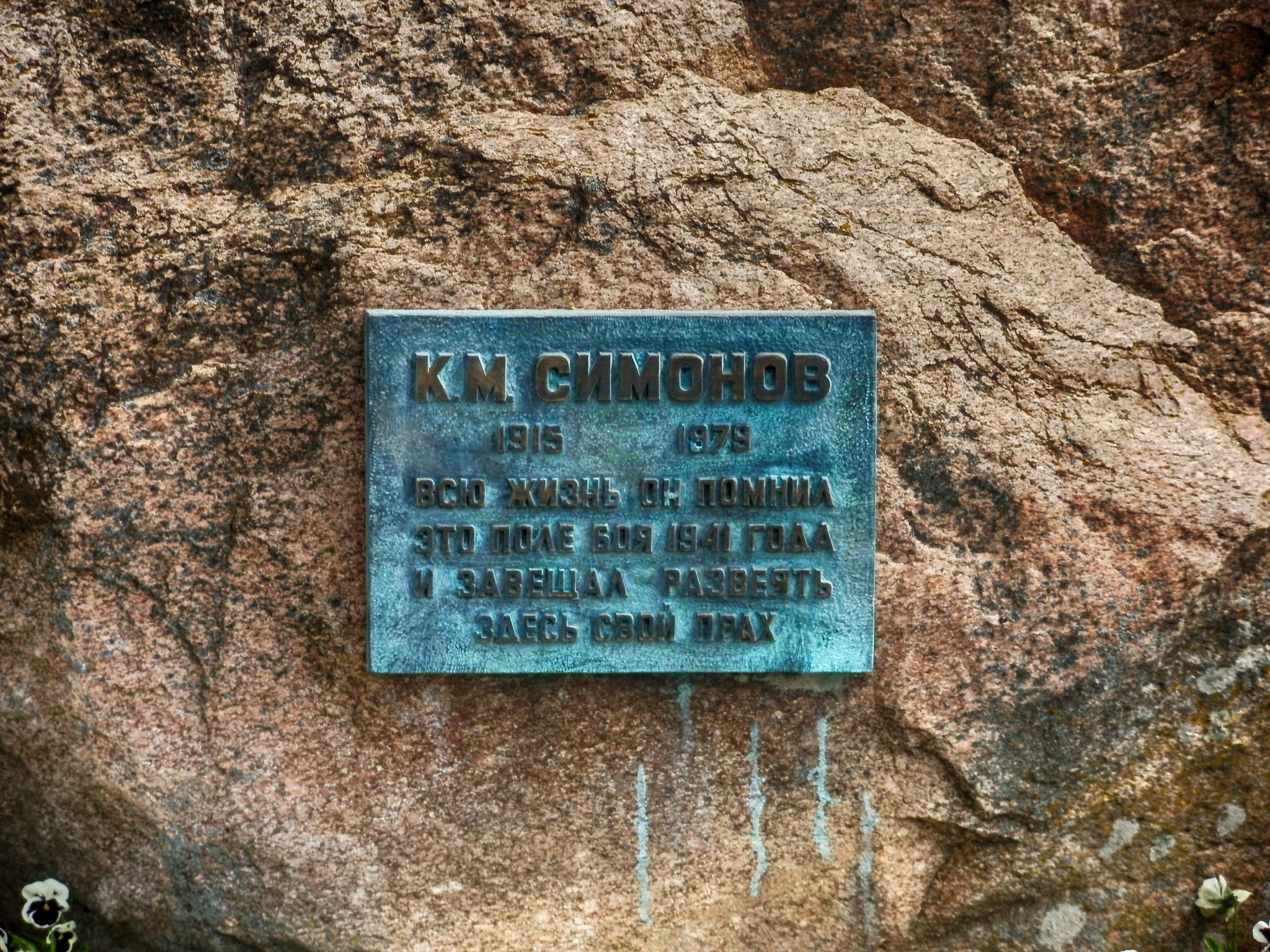 Беларуская (тарашкевіца): Мэмарыяльны комплекс -Буйницкае поле